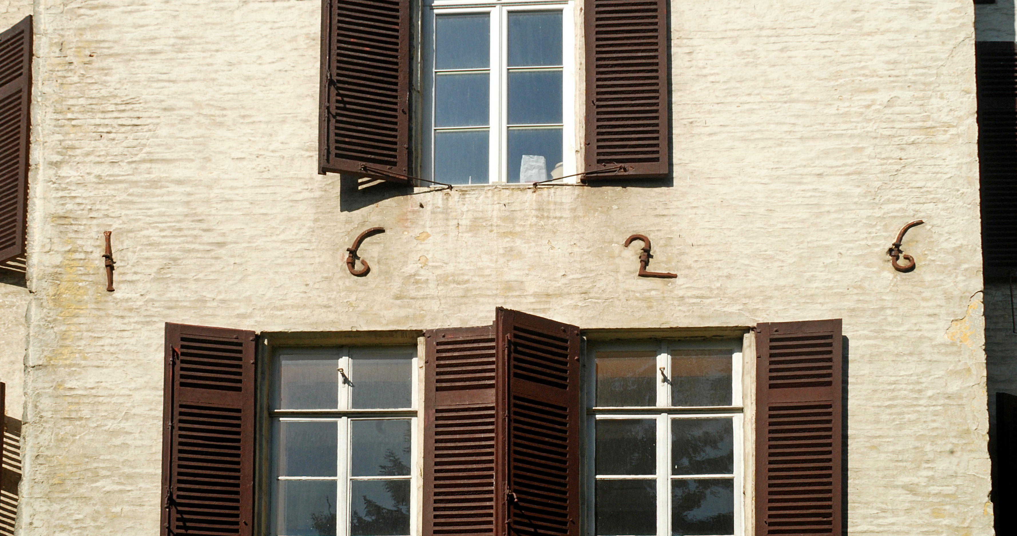 Belgique - Wallonie - Château d'Ottignies